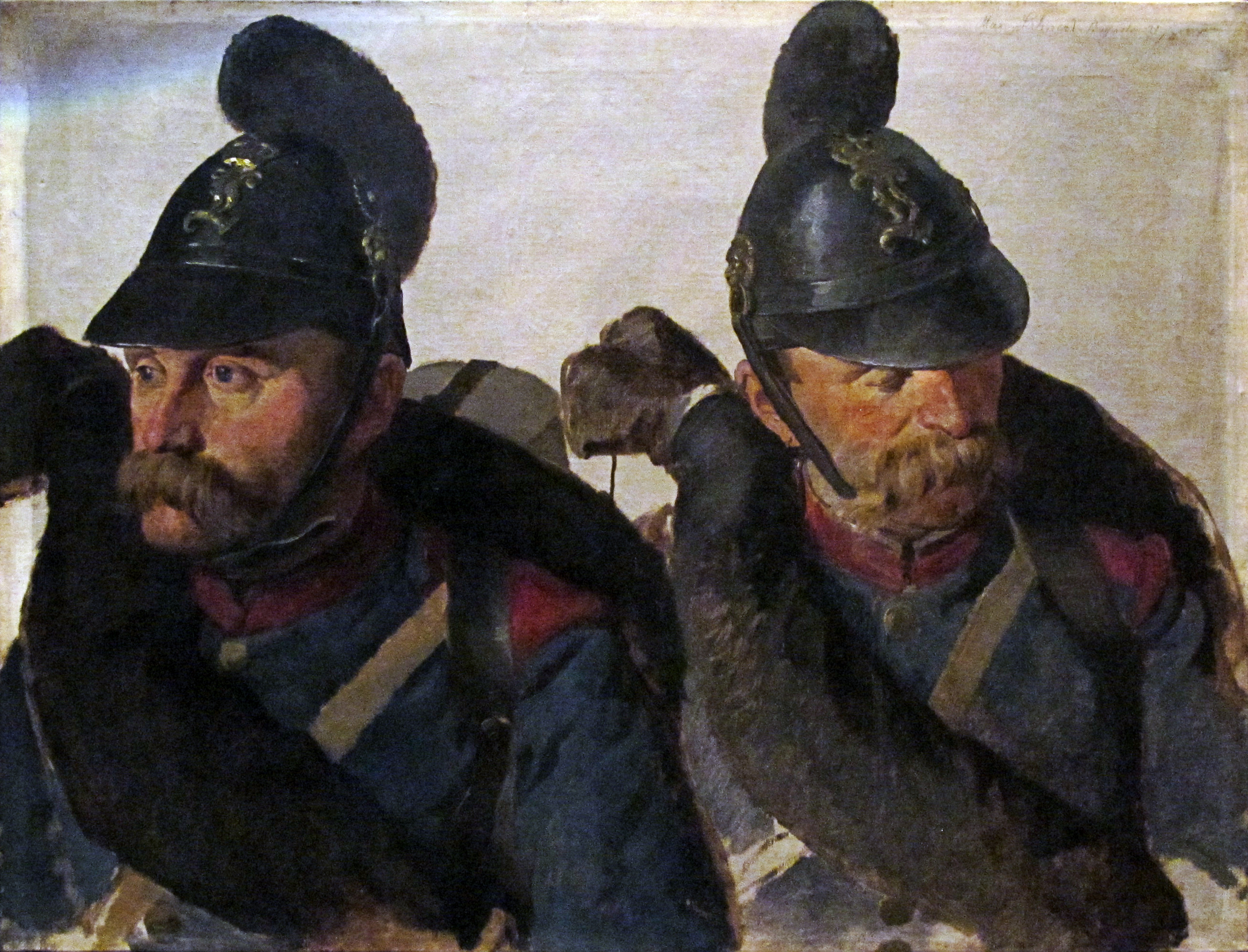 Gemälde von Louis Braun (1836-1916) um das Jahr 1870. Es zeigt den bayerischen Infanteristen Max Lehner, Krankenträger der Sanitätskompanie, aus zwei Perspektiven. Standort: Bayerisches Armeemuseum, Ingolstadt